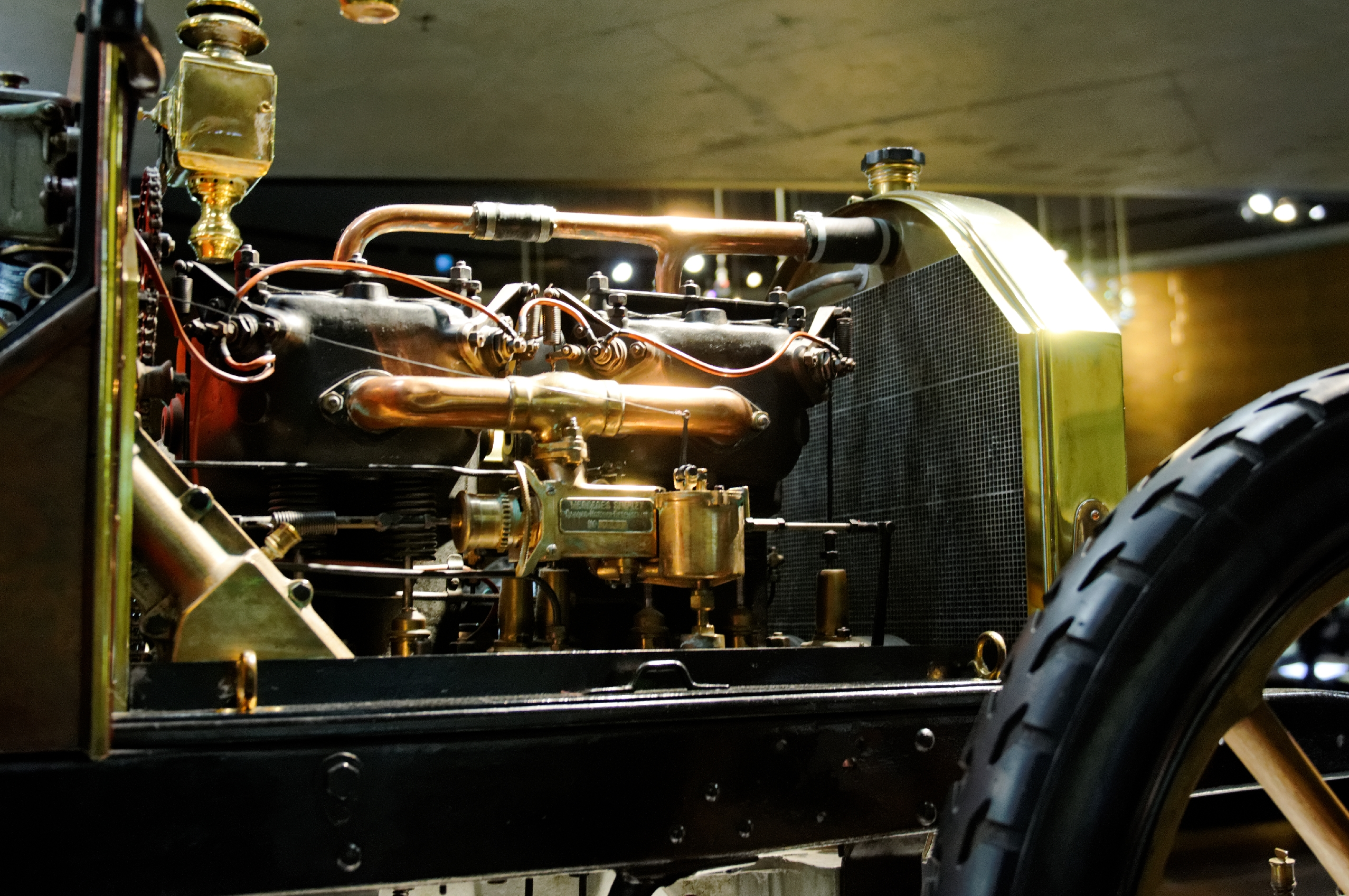 Bilder aus dem Mercedes-Benz-Museum 2015